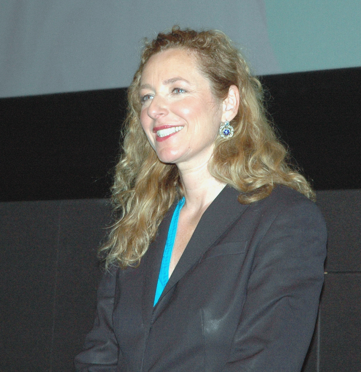 Diana Iljine auf der Pressekonferenz zum Start Filmfest 2014